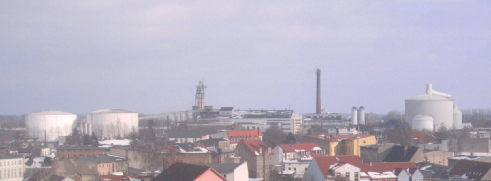 Zuckerfabrik in Anklam aus Blickrichtung vom Steintor